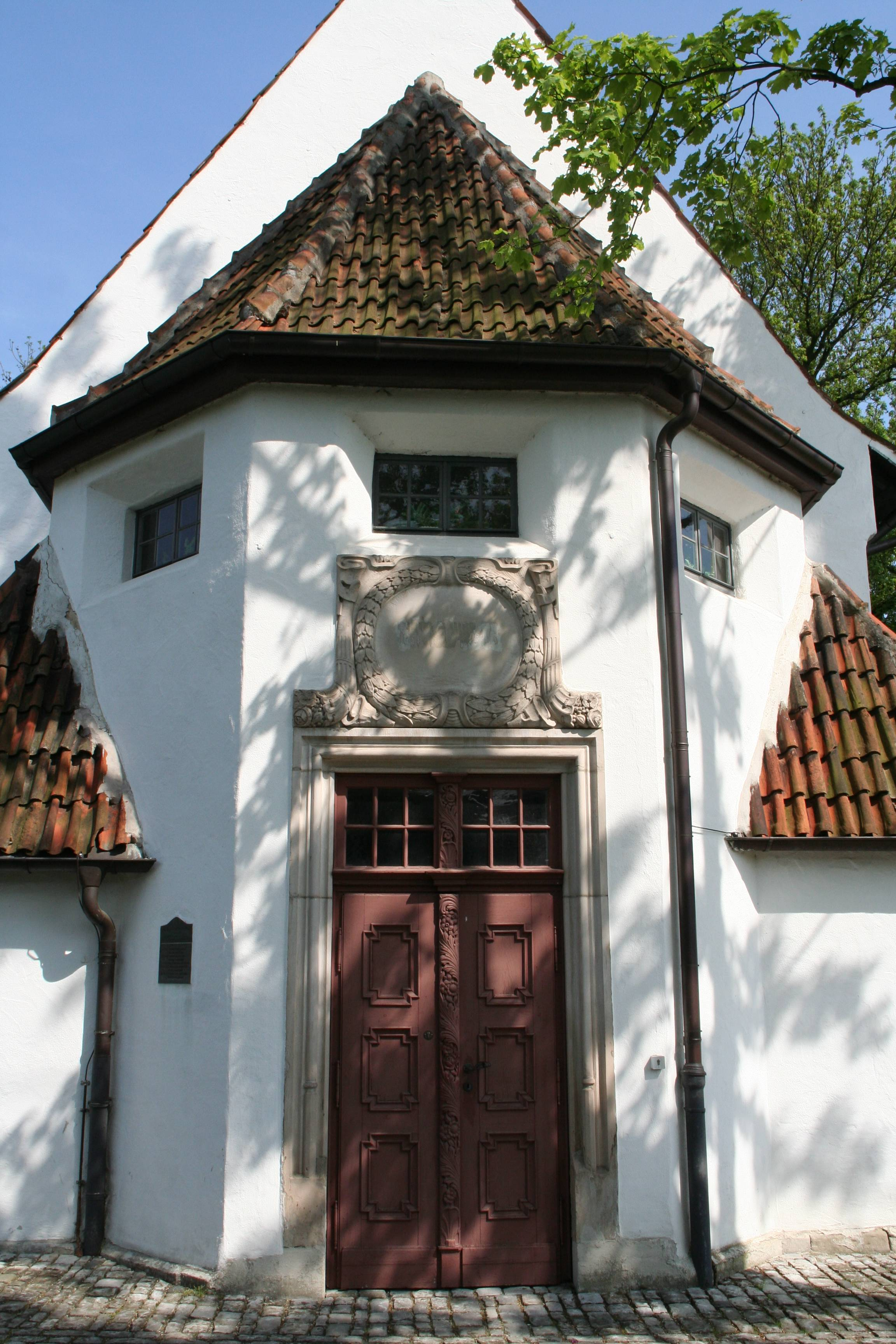 Coburg, Nikolauskapelle